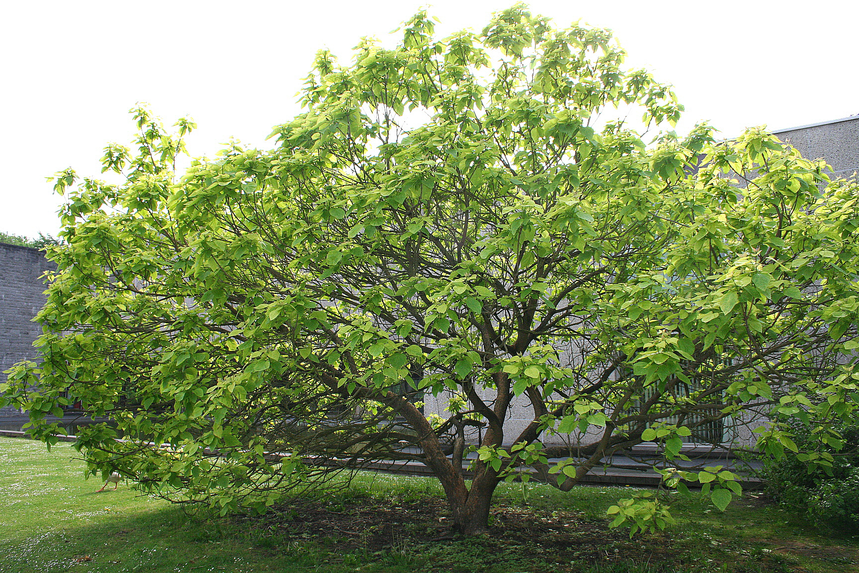 Catalpa erubescens ou Catalpa hybride variété 'Pulverulenta' (Catalpa erubescens 'Pulverulenta'). Circonférence en cm mesurée à 1m50 du sol: 92 cm (2005) Hauteur: 5 m (2005) Position exacte : Morlanwelz-Mariemont (Belgique) – Parc du domaine de Mariemont.